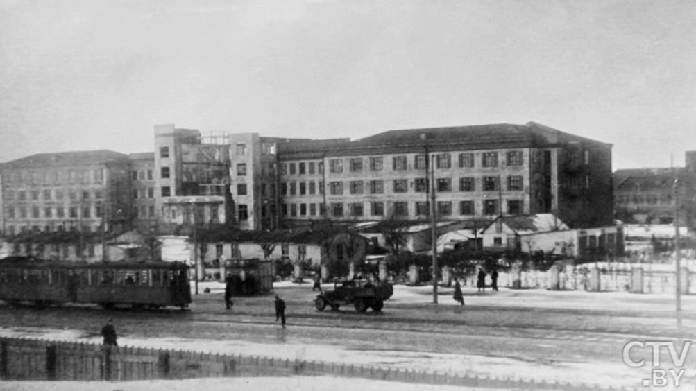 Перабудова галоўнага корпуса БПІ ў 1946 годзе